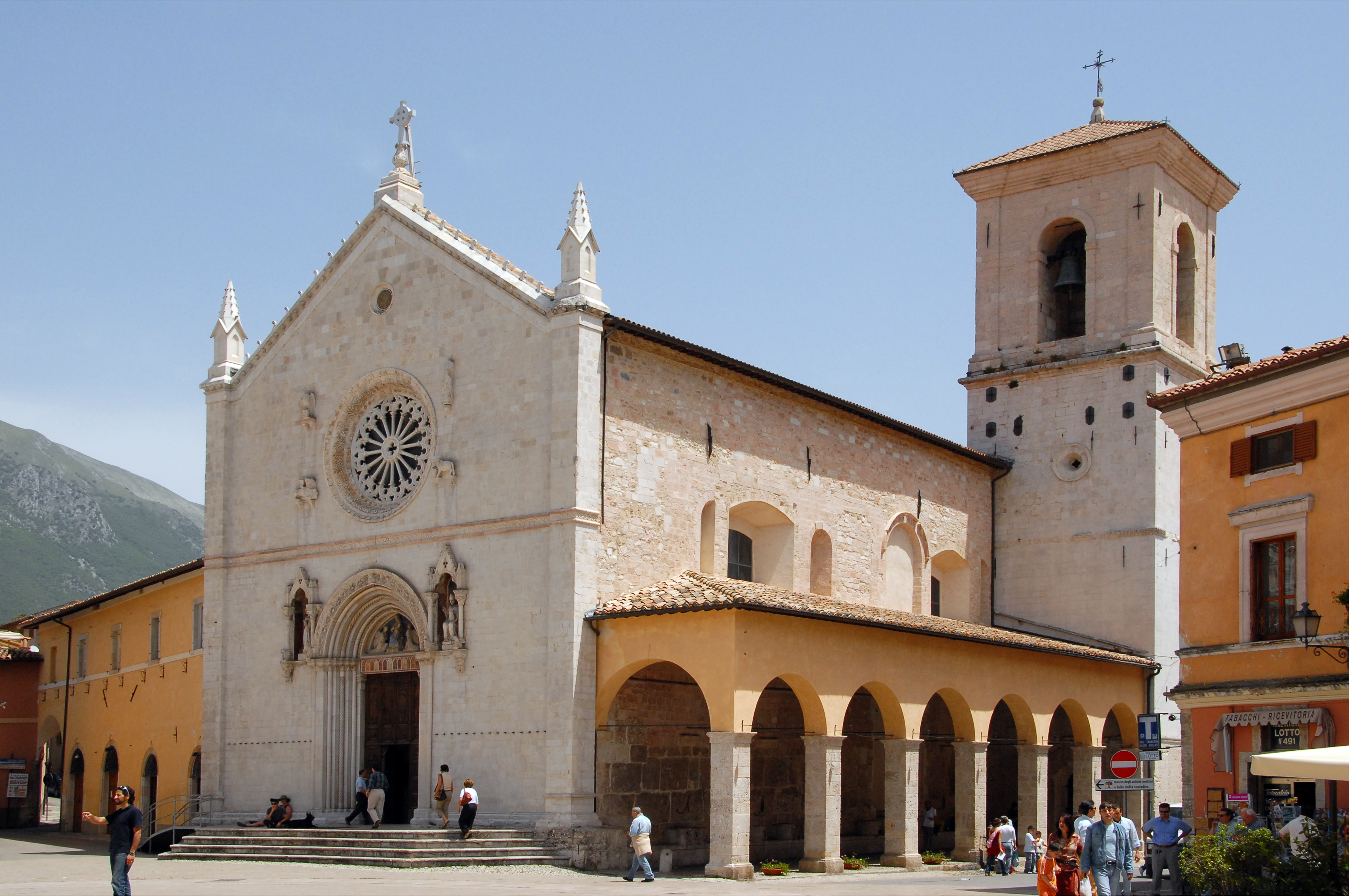 Basilica di San Benedetto Norcia